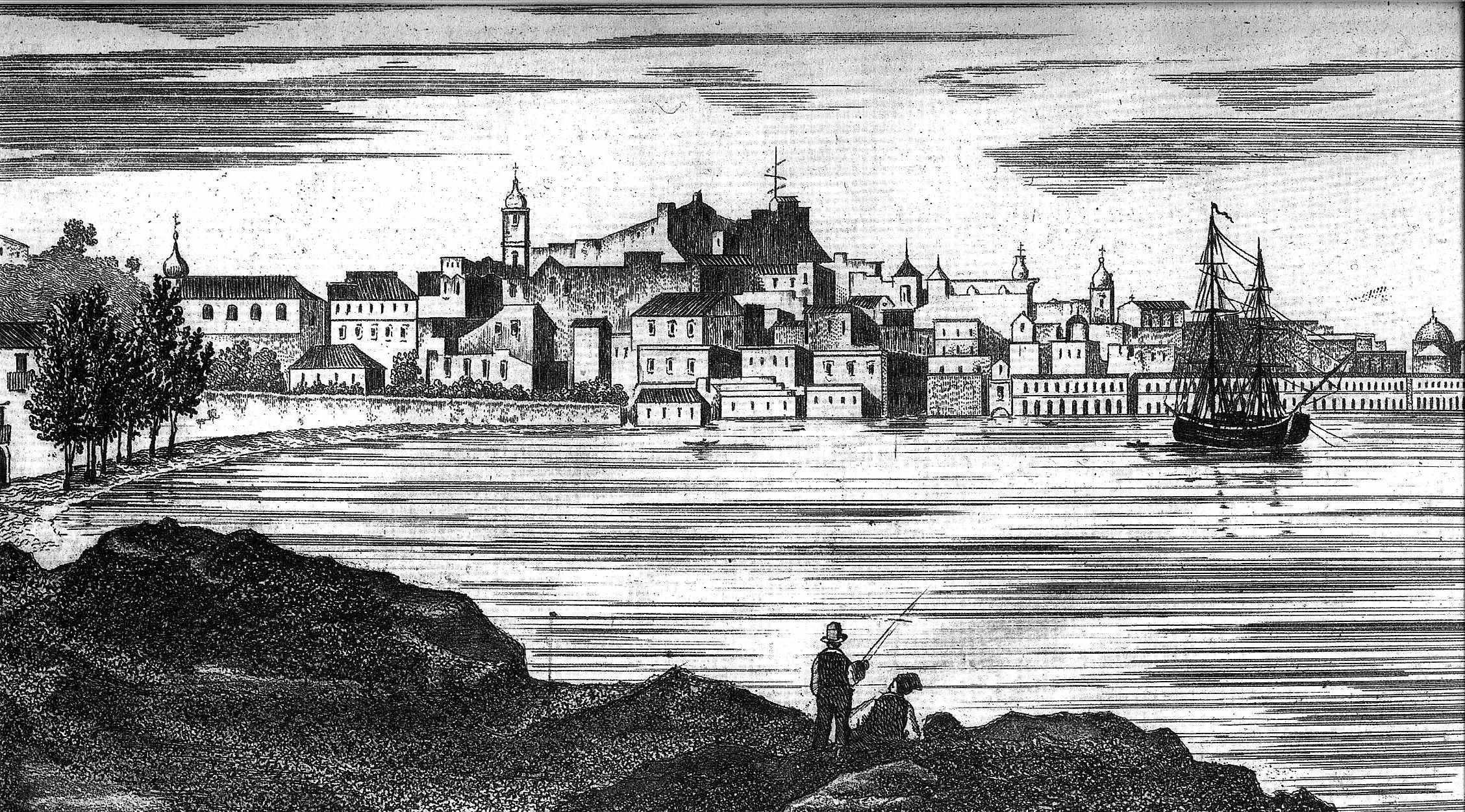 old Reggio Calabria drawing